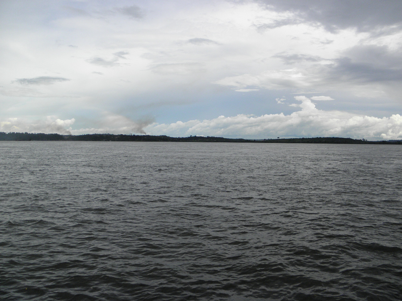 Rio Tapajos (2) em Itaituba